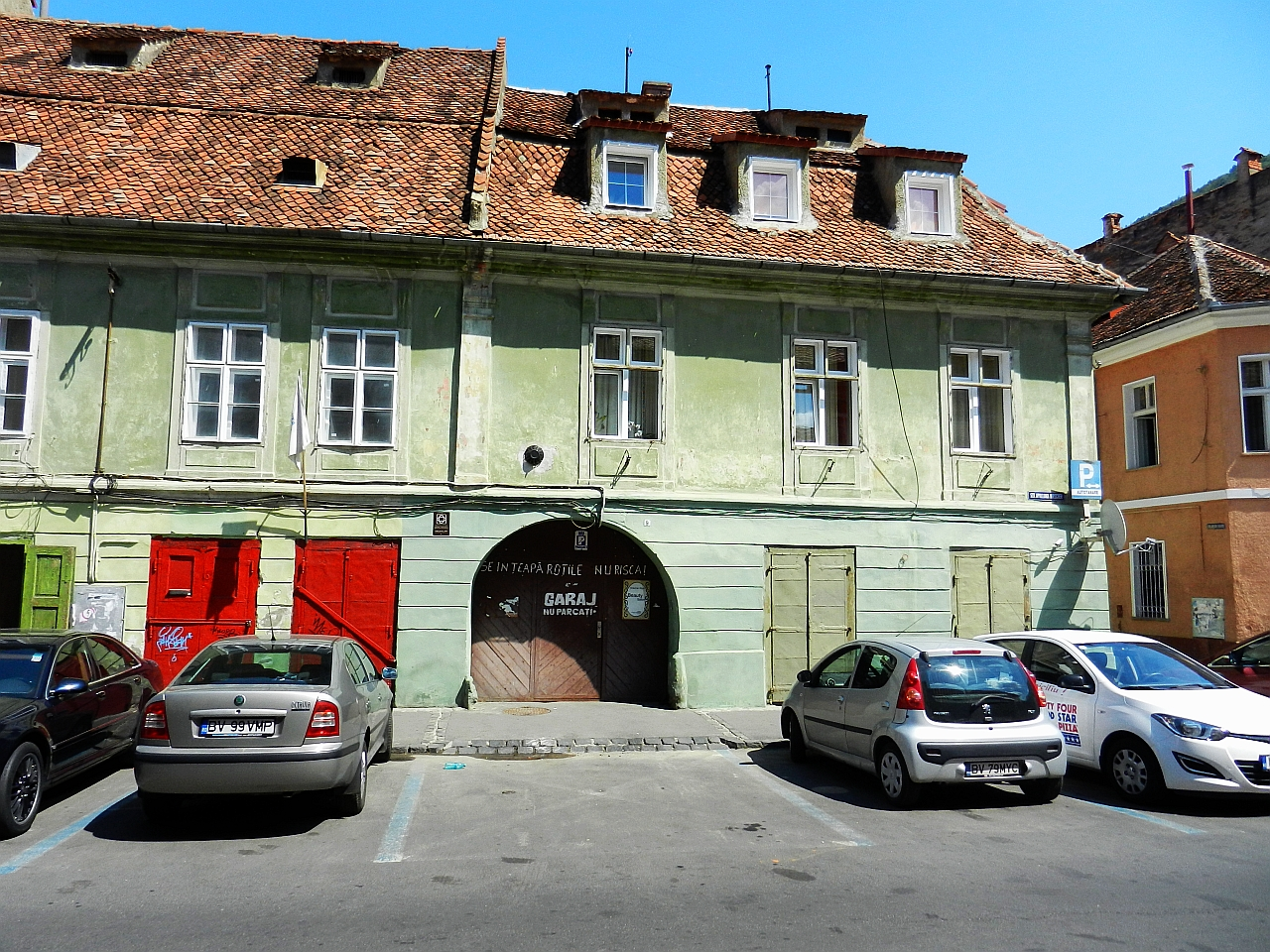 Casă monument